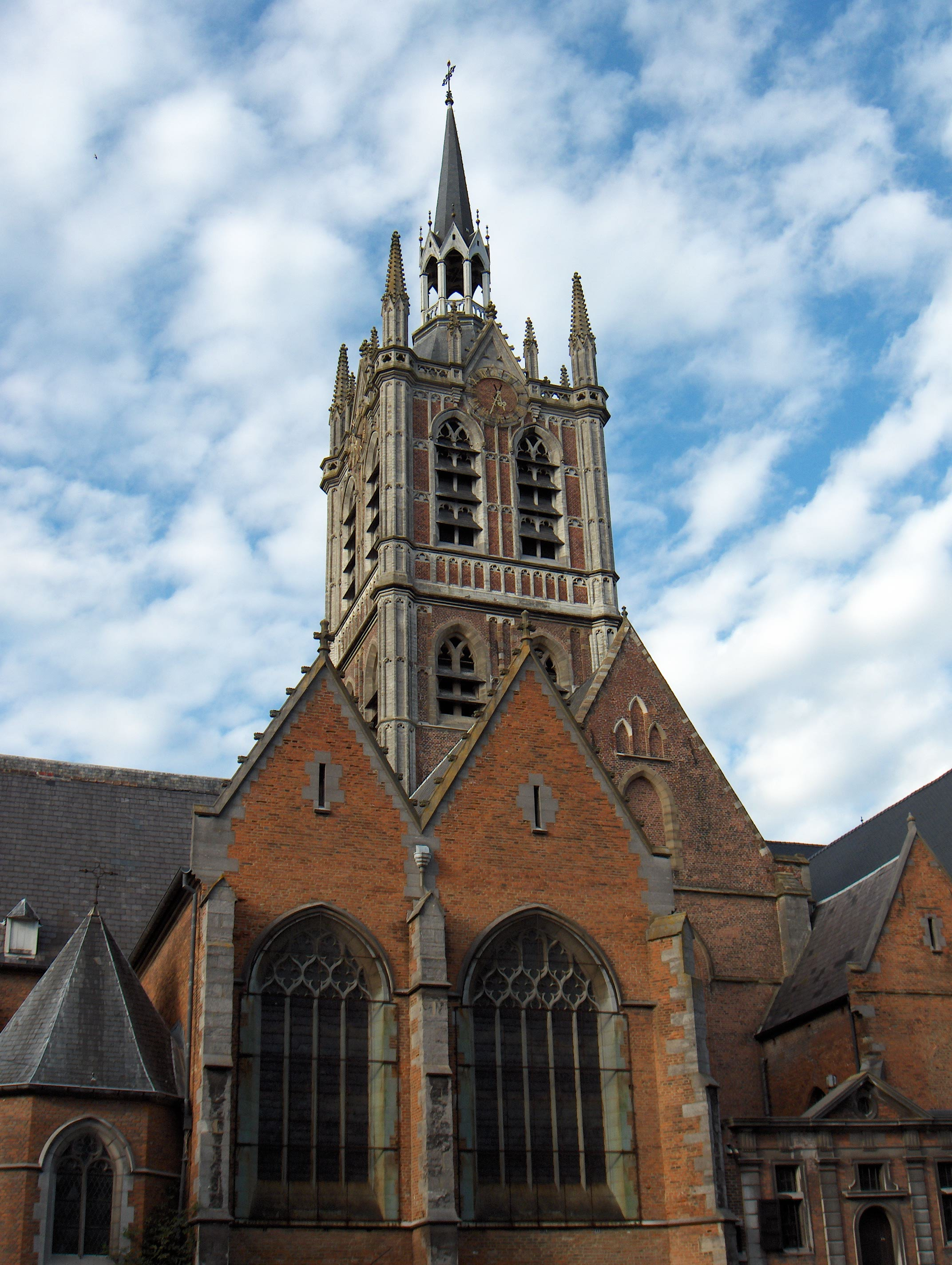 Beschreibung: Enghien (frz.)/Edingen (ndl.), Hennegau (prov. Hainaut), Nikolaikirche (église Saint-Nicolas/Sint-Niklaaskerk; 15. Jh. - 19. Jh. Fotograf: Friedrich Tellberg Datum: 17. September 2005